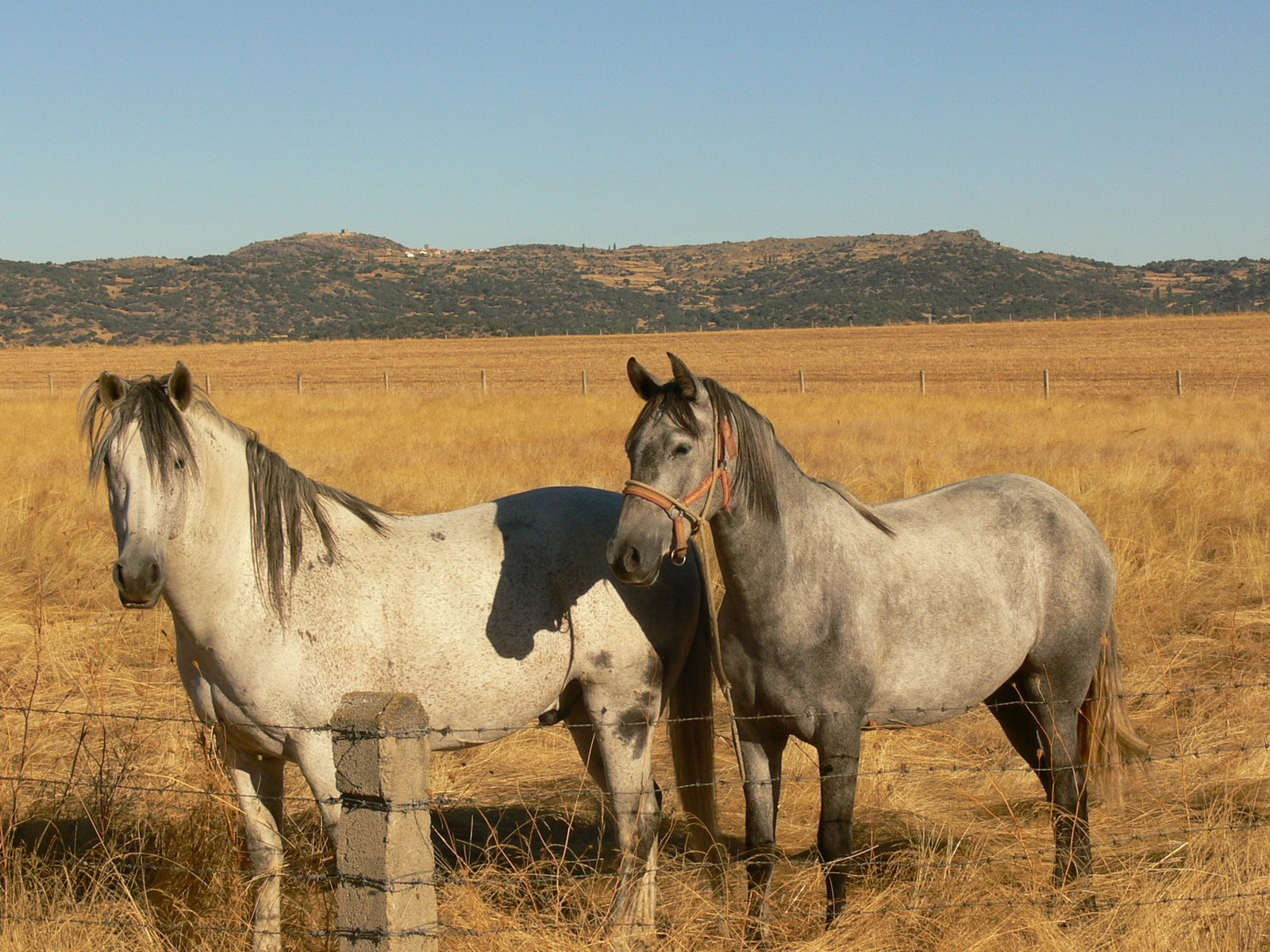 al fondo sobre la sierra El Mirón y su castillo y caballos en el Valle del Corneja, Ávila